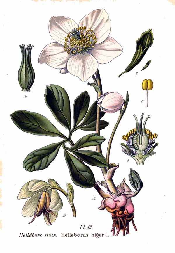 Helleborus niger L.